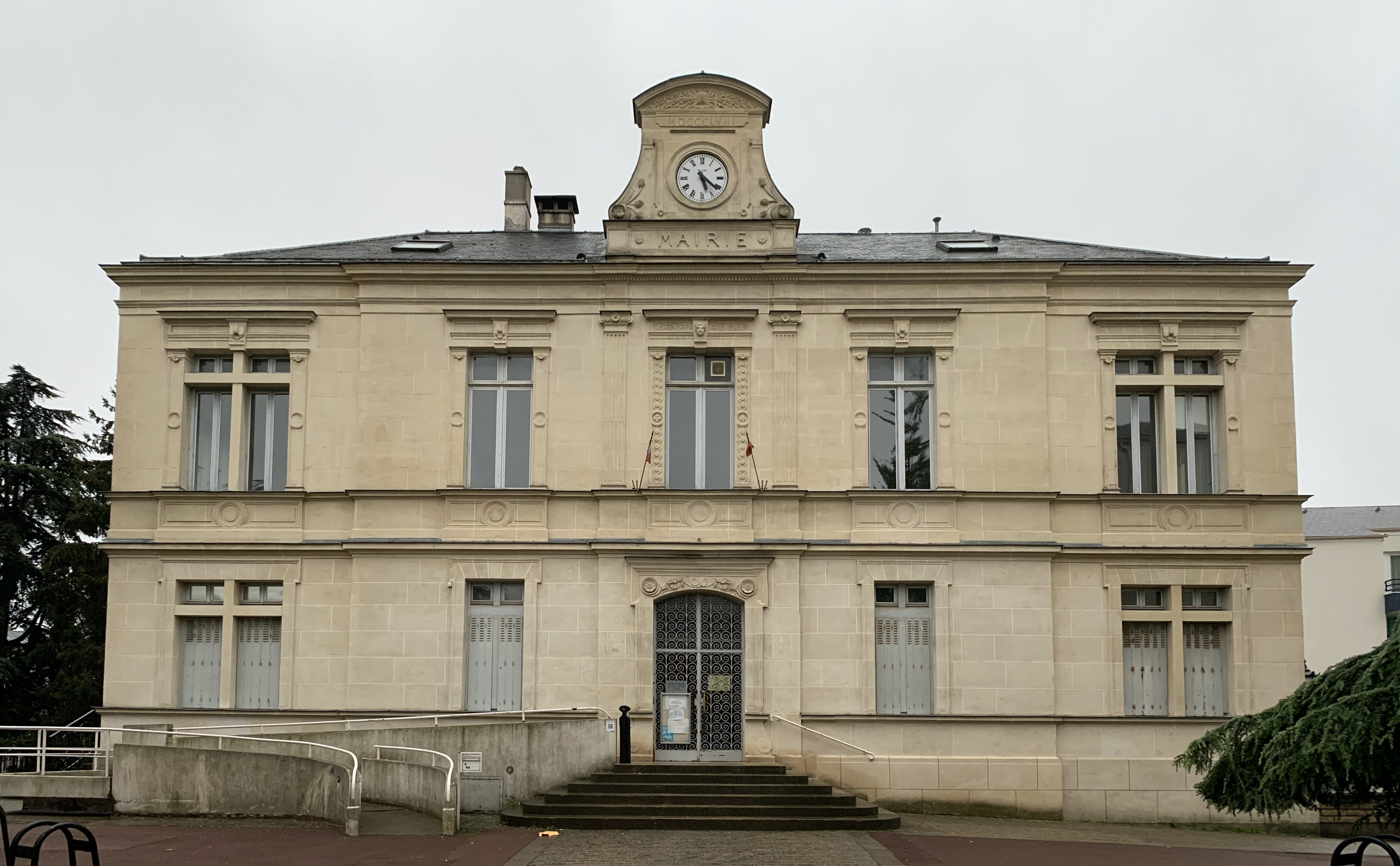 Ancienne mairie de Fontenay-sous-Bois.